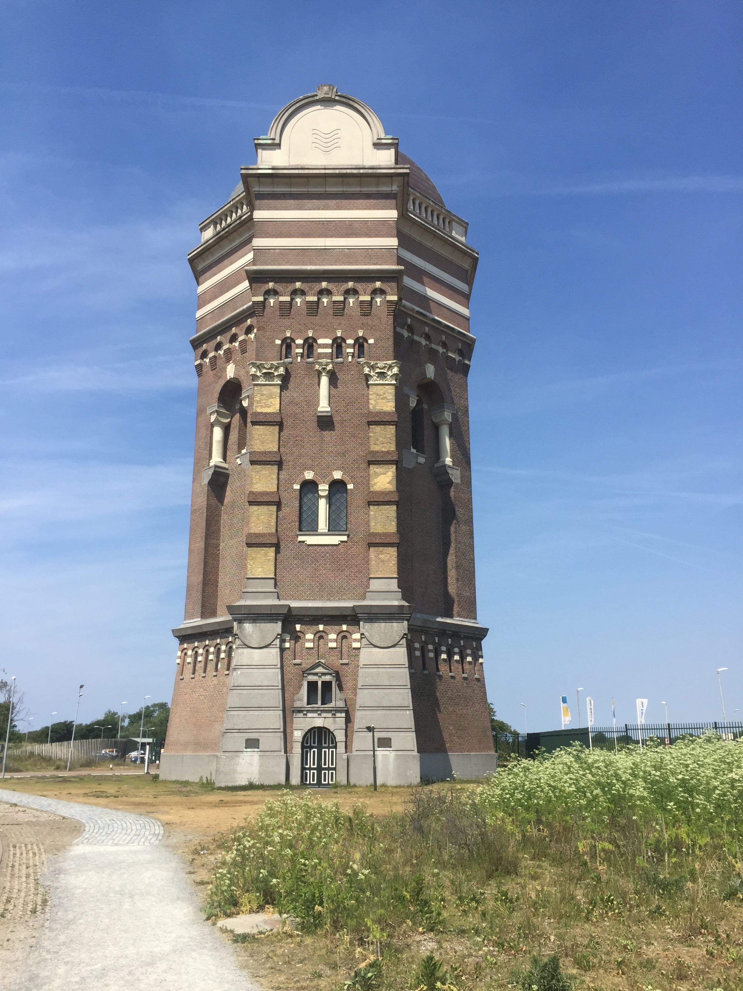 Watertoren aan de Pompstationweg in Den Haag.